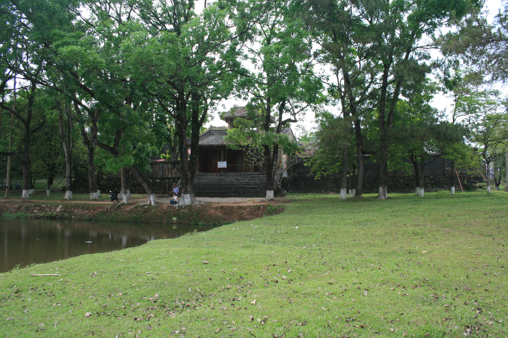 Tomb of DongKhanh (Lăng Đồng Khánh, nhìn từ mặt trước)